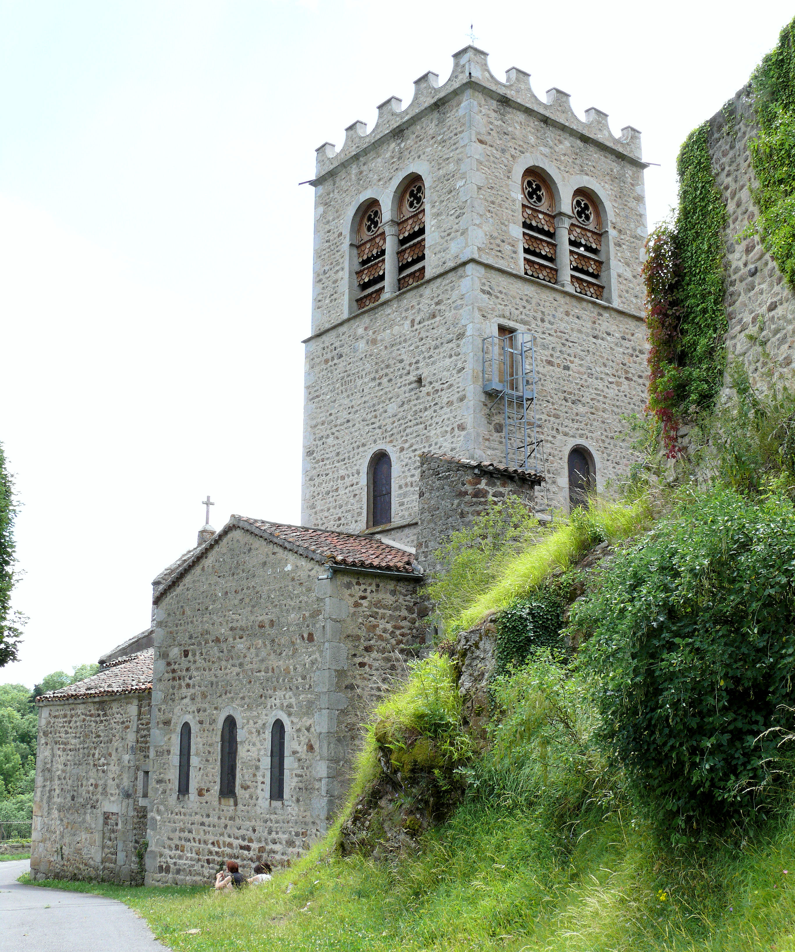 Vieil Ecotay - L'église au pied du château